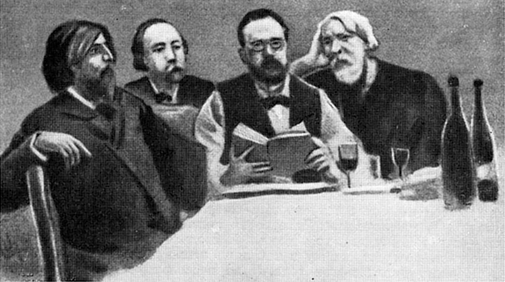 Daudet, Flaubert, Zola, Tourgueniev